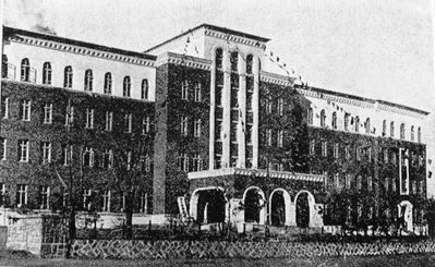 The first hospital of Hsinking（新京特別市立第一病院）